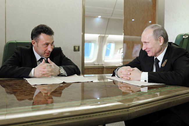 Владимир Путин с начальником сборочного цеха предприятия «Уралвагонзавод» Игорем Холманских.